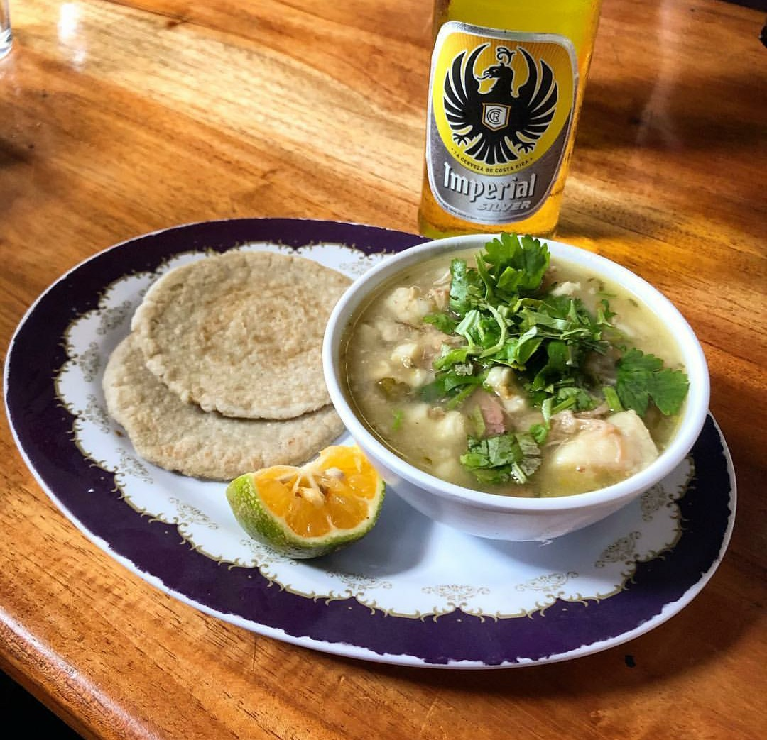 Versión jpg del archivo Archivo:Pozol costarricense.png